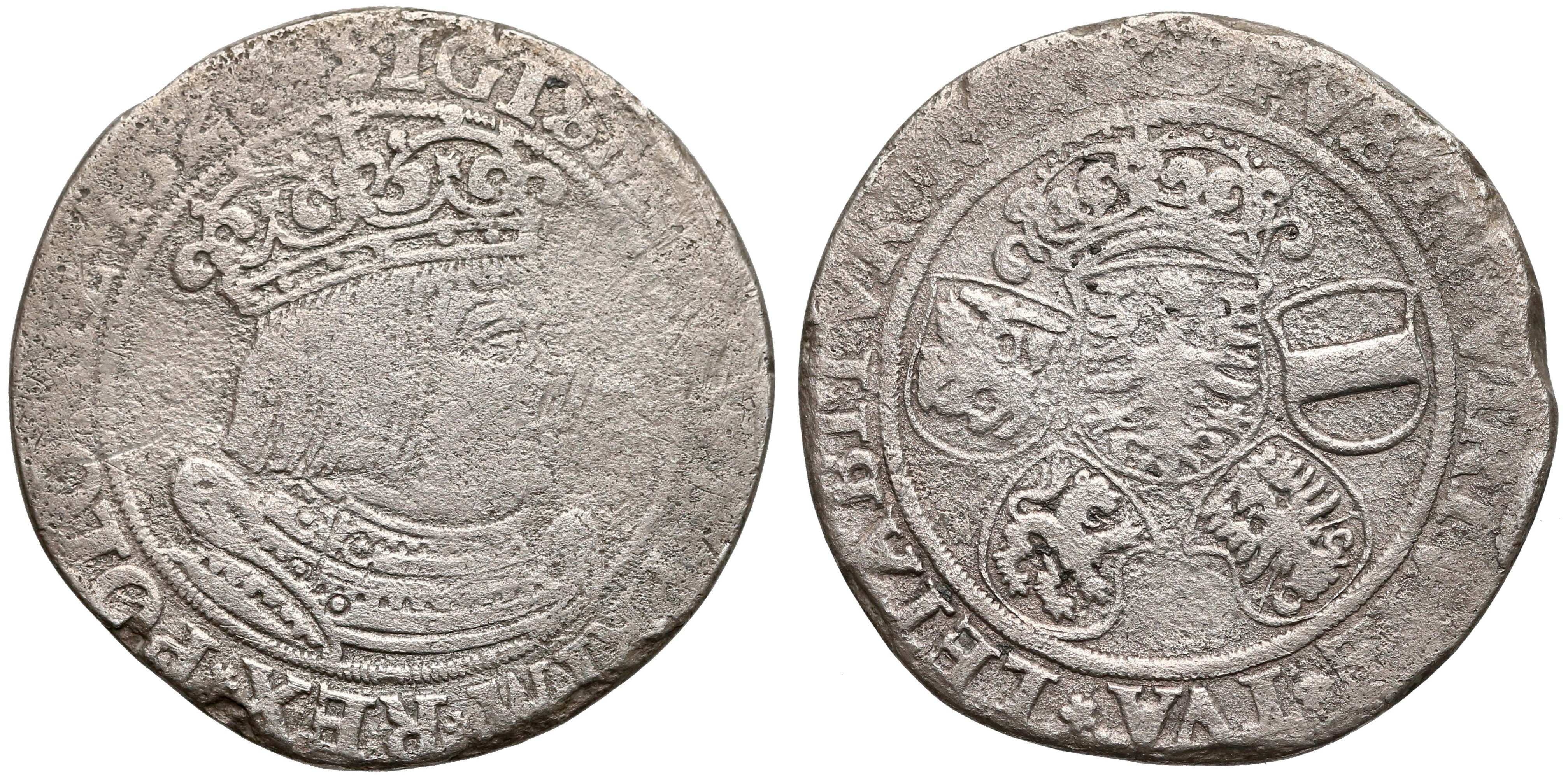 Szóstak koronny 1528 Kraków